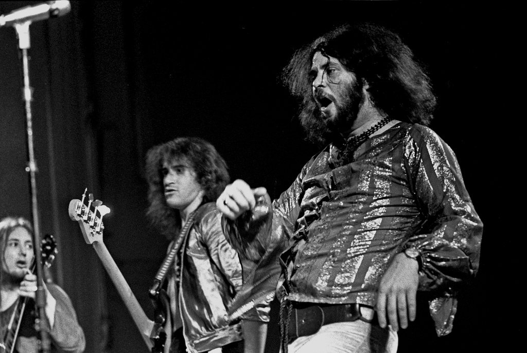 Gentle Giant, Hamburg 1974